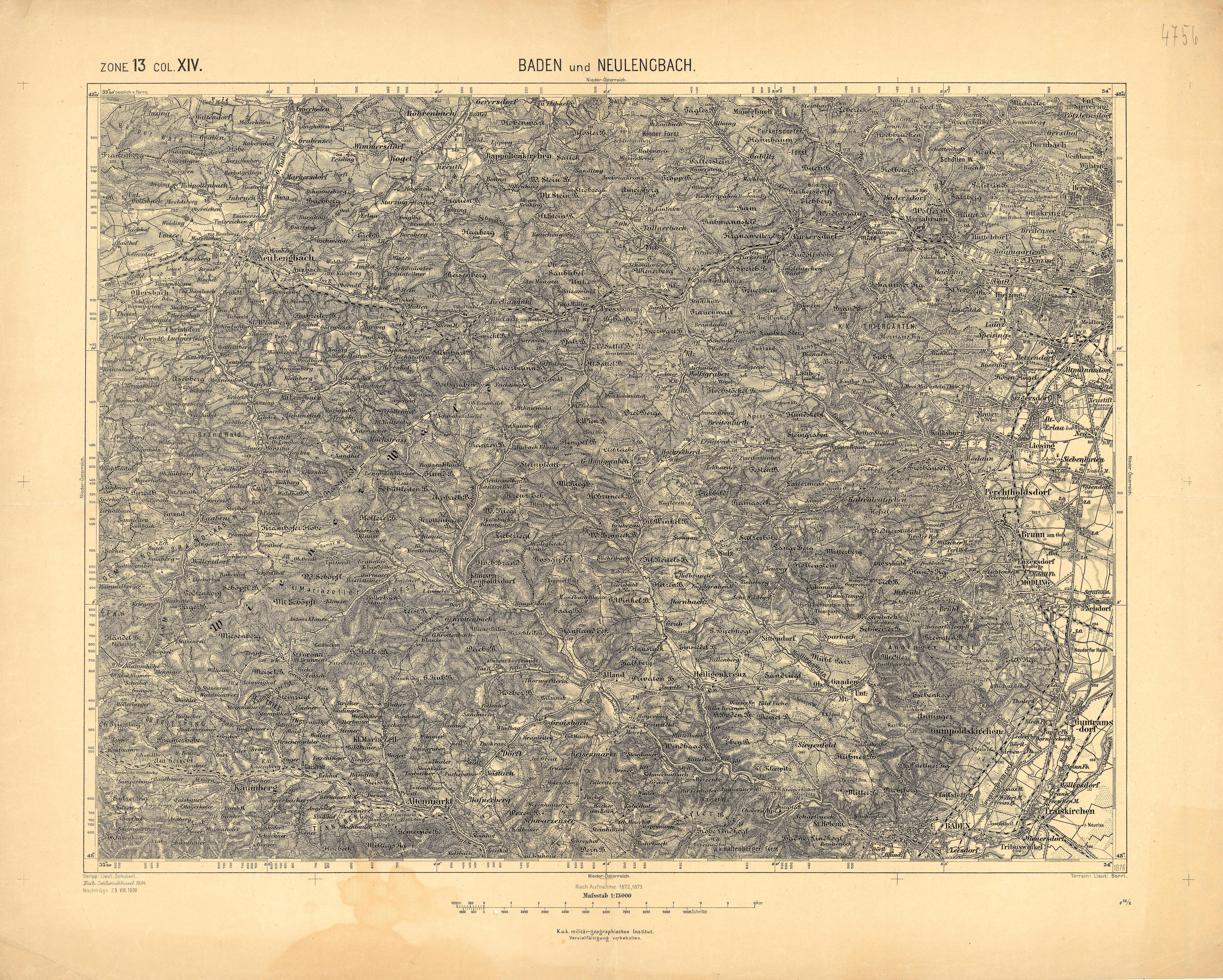 historische Landkarte: Spezialkarte 1:75.000, franzisco-josephinische (3.) Landesaufnahme der österreichisch-ungarischen Monarchie. Blatt Baden und Neulengbach (Niederösterreich und Südwesten von Wien mit Wiental, Schönbrunn, Meidling, Dornbach). Nr. 4756. Zone 13 Kolumne XIV.